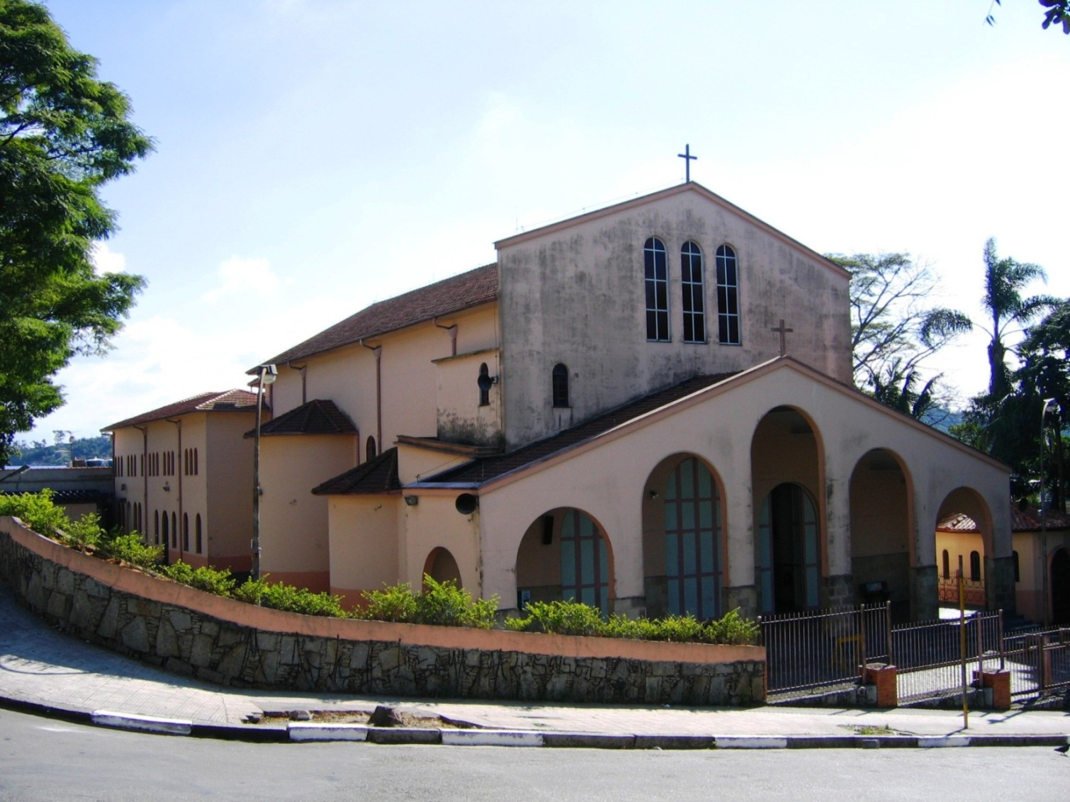 Igreja Matriz de Ribeirão Pires